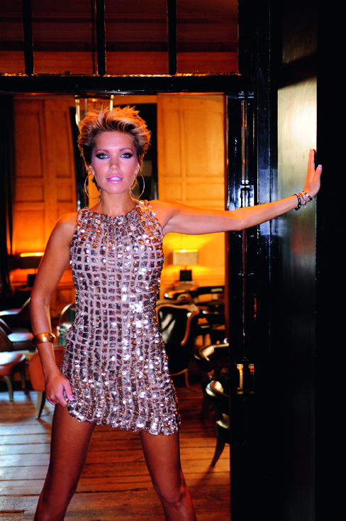 Sylvie van der Vaart